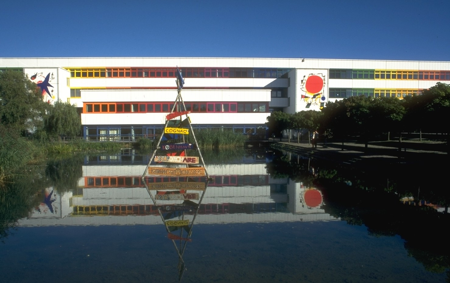 Kurt-Tucholsky-Schule in Flensburg